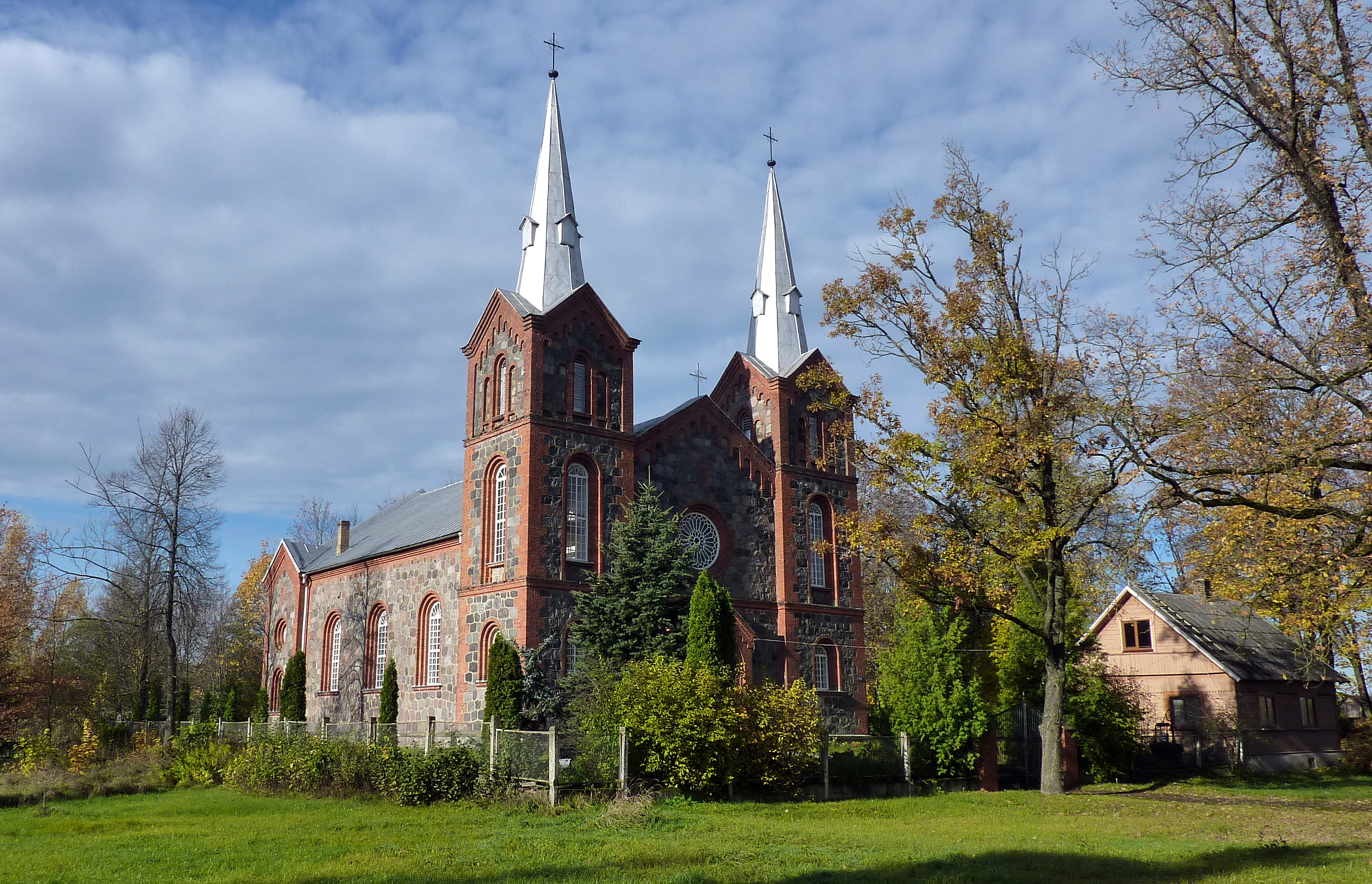 Rybniszki - rzymskokatolicki kościół parafialny p.w. św. Piotra i Pawła